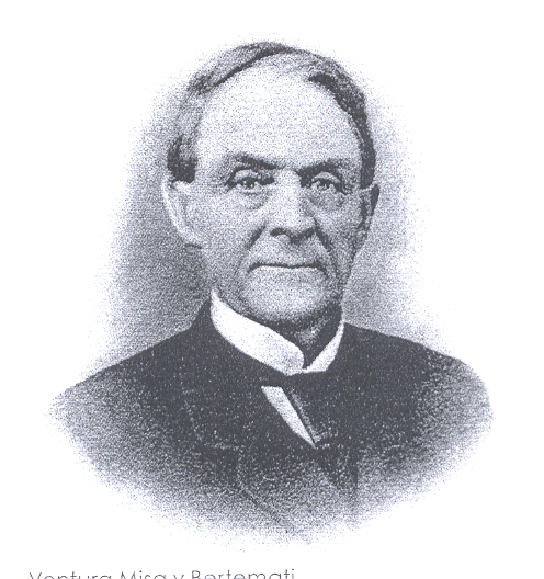 Ventura Misa y Bertemati, Empresario bodeguero, filántropo.